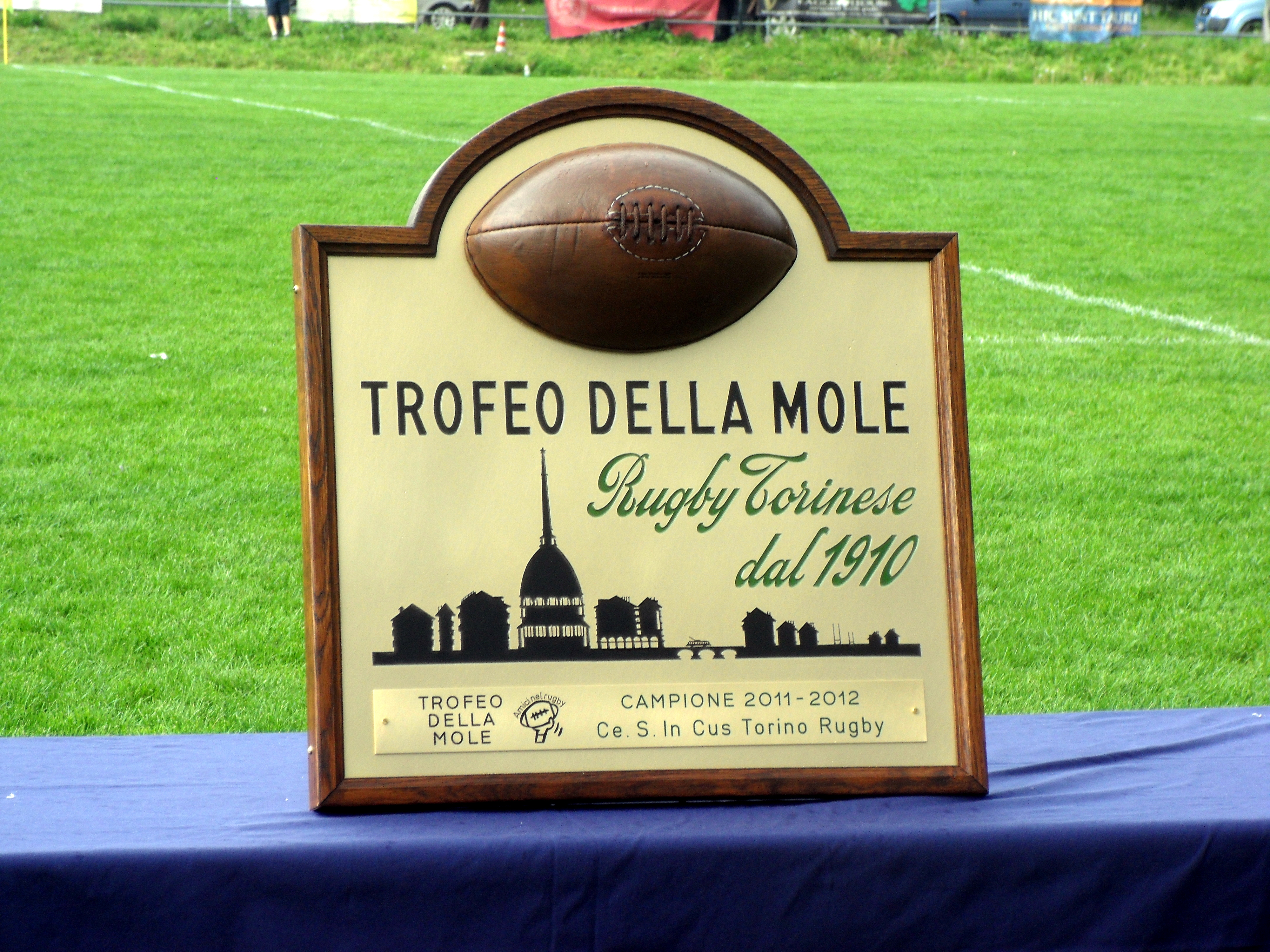 Planche en bois avec un ballon de rugby incrusté et une représentation symbolique de la Mole Antonelliana de Turin